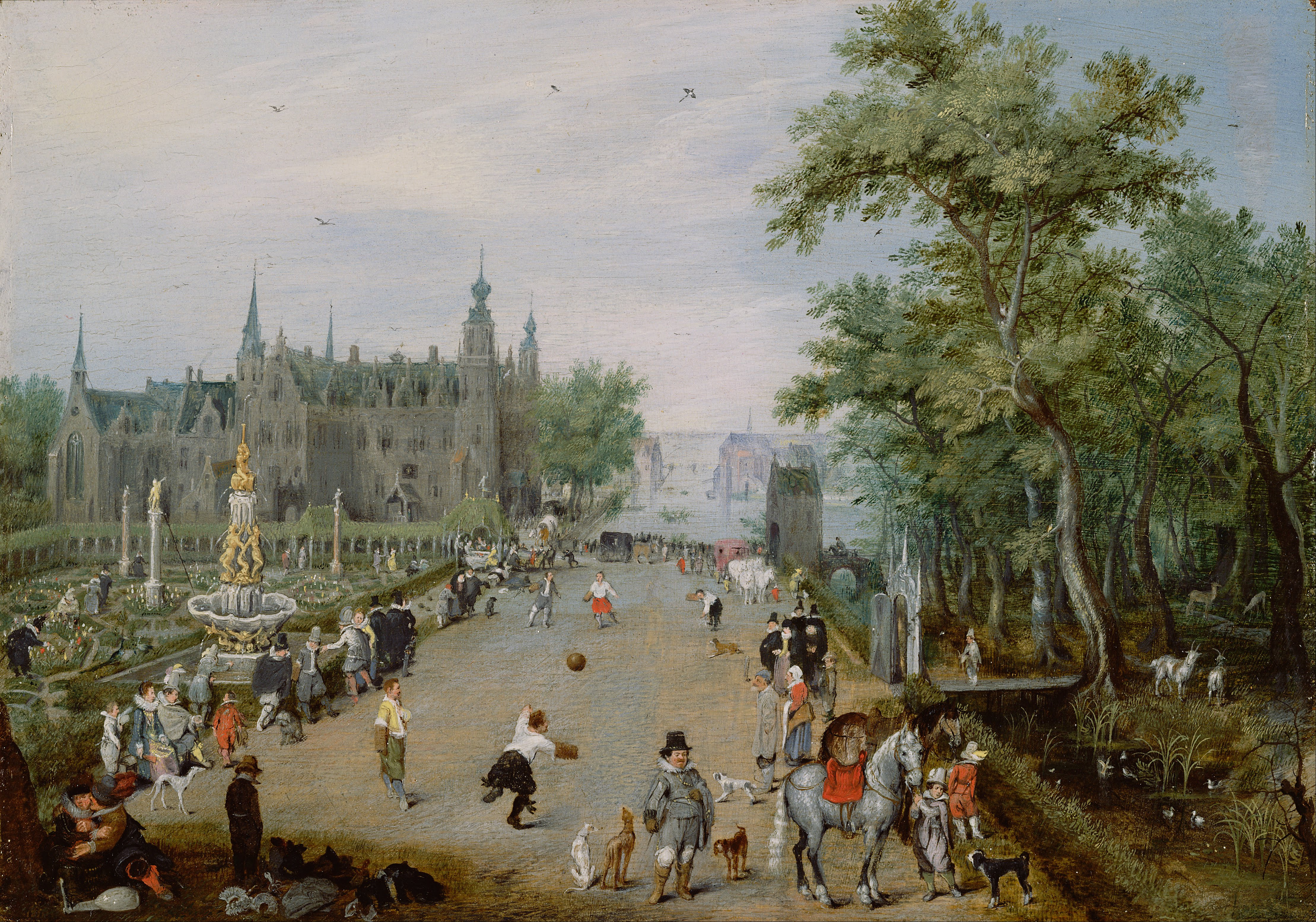 Peinture de van de Venne: « Un jeu de paume devant un château à la campagne ». Malgré le titre du tableau, il ne s'agit pas d'un jeu de paume mais d'une partie de « jeu de Ballon avec Brassard »